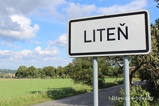 Liteň vítá - značka obec Liteň na Měňanské ulici ve směru od Berouna